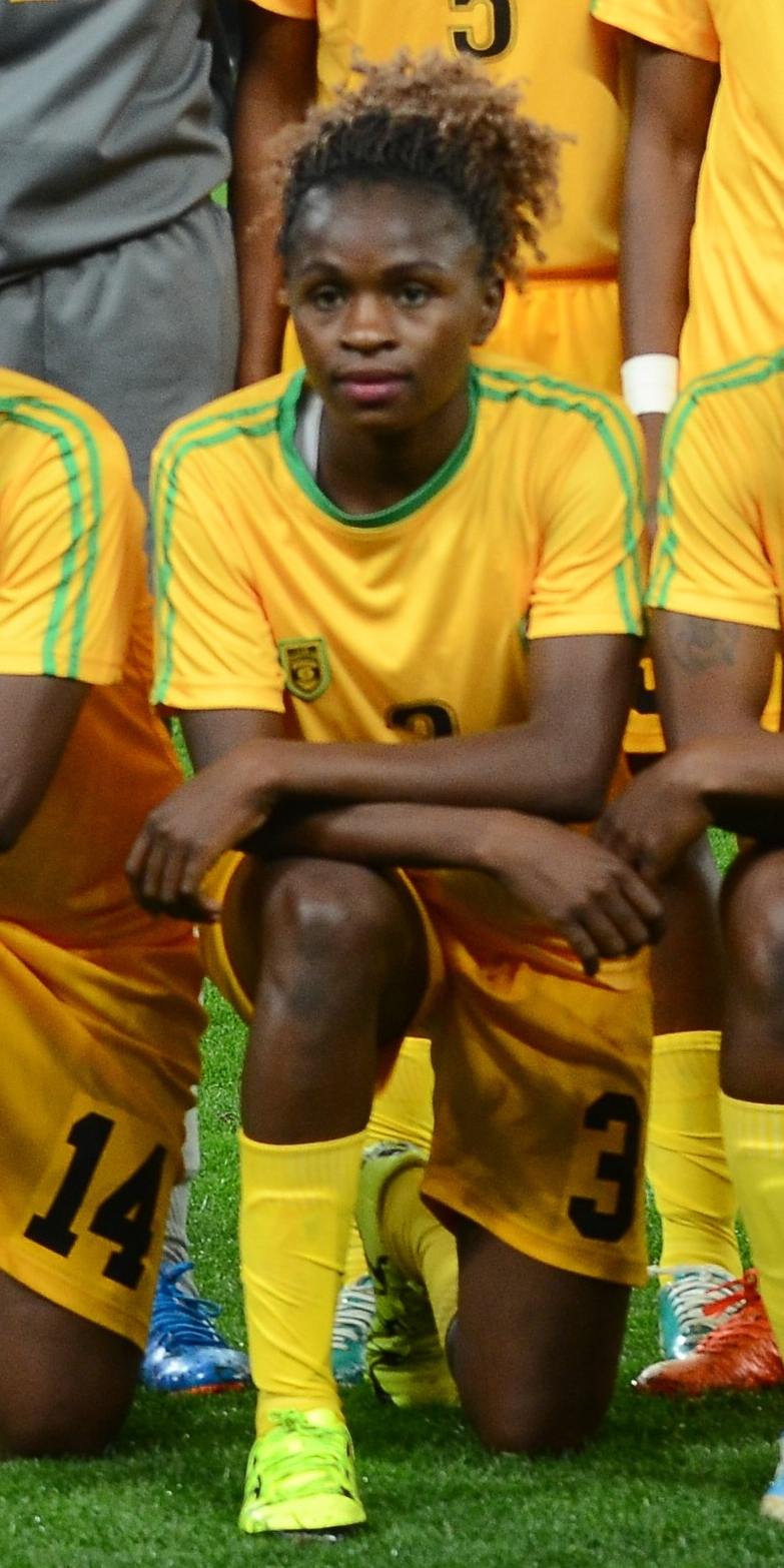 São Paulo - Seleções femininas do Zimbábue e da Alemanha se enfrentam na Arena Corinthians (Rovena Rosa/Agência Brasil)